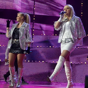 Группа "Мираж" на фестивале "Легенды Ретро FM 2009"